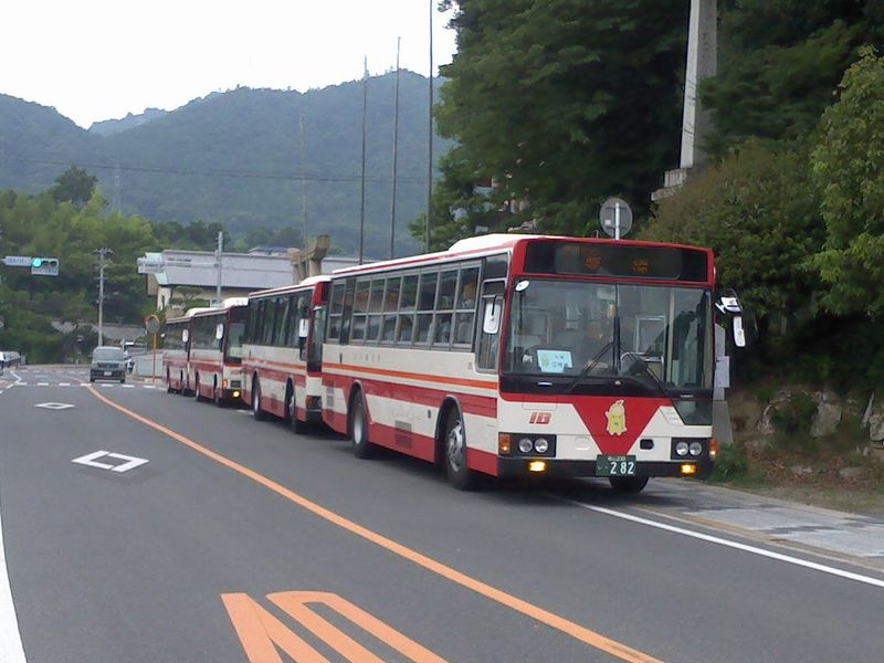 因の島運輸の路線用一般バス